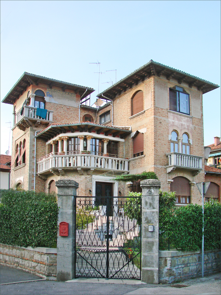 La villa Anita via Fra' Mauro ancienne pension Palma La villa a été conçue par l'architecte Attilio Perez en 1923, elle est inspirée par l'architecture byzantine et romaine _______________